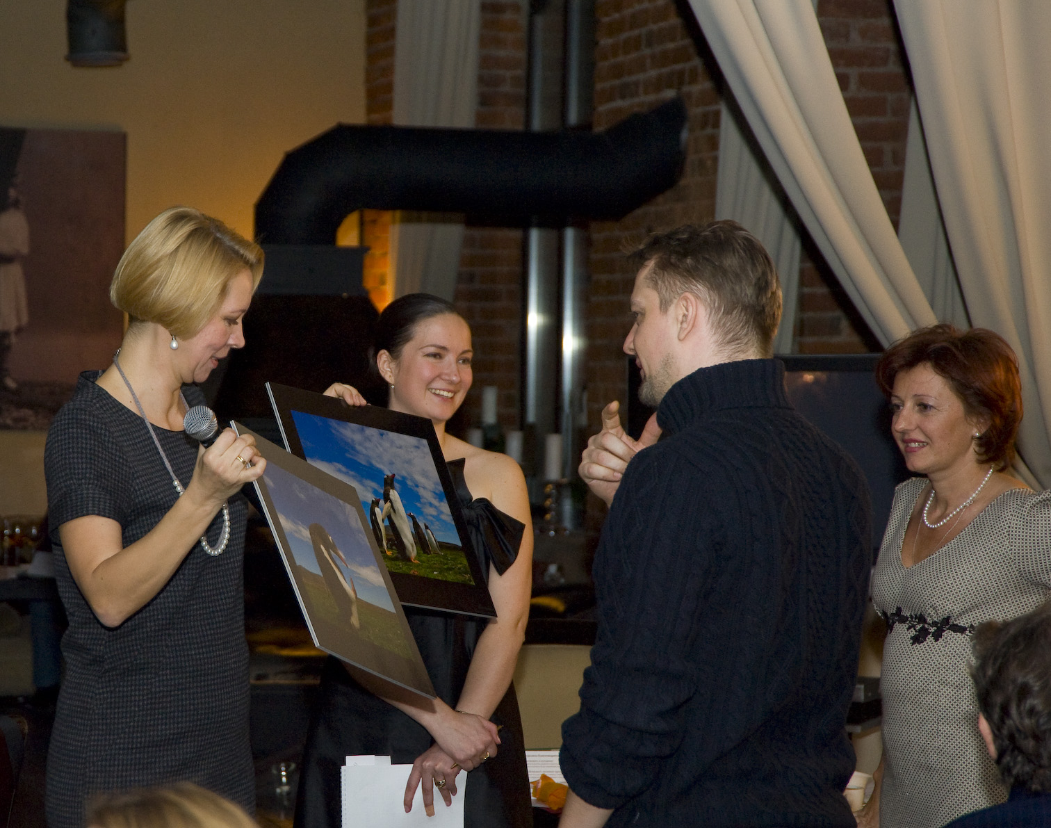 Александр Пушной покупает фотографии на благотворительном аукционе. Ежегодный благотворительный вечер фонда «Созидание».